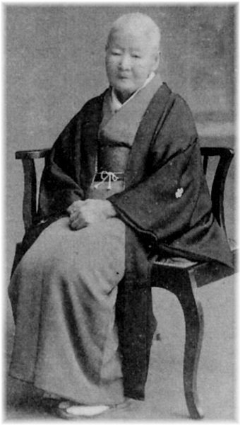 一色須賀(徳川慶喜側室)の肖像写真